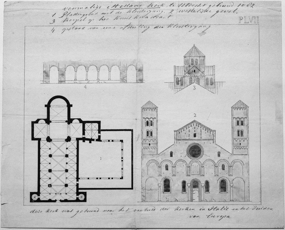 Sint Maria Kerk: kerk, reproductie van tekening, Gemeente Archief Utrecht